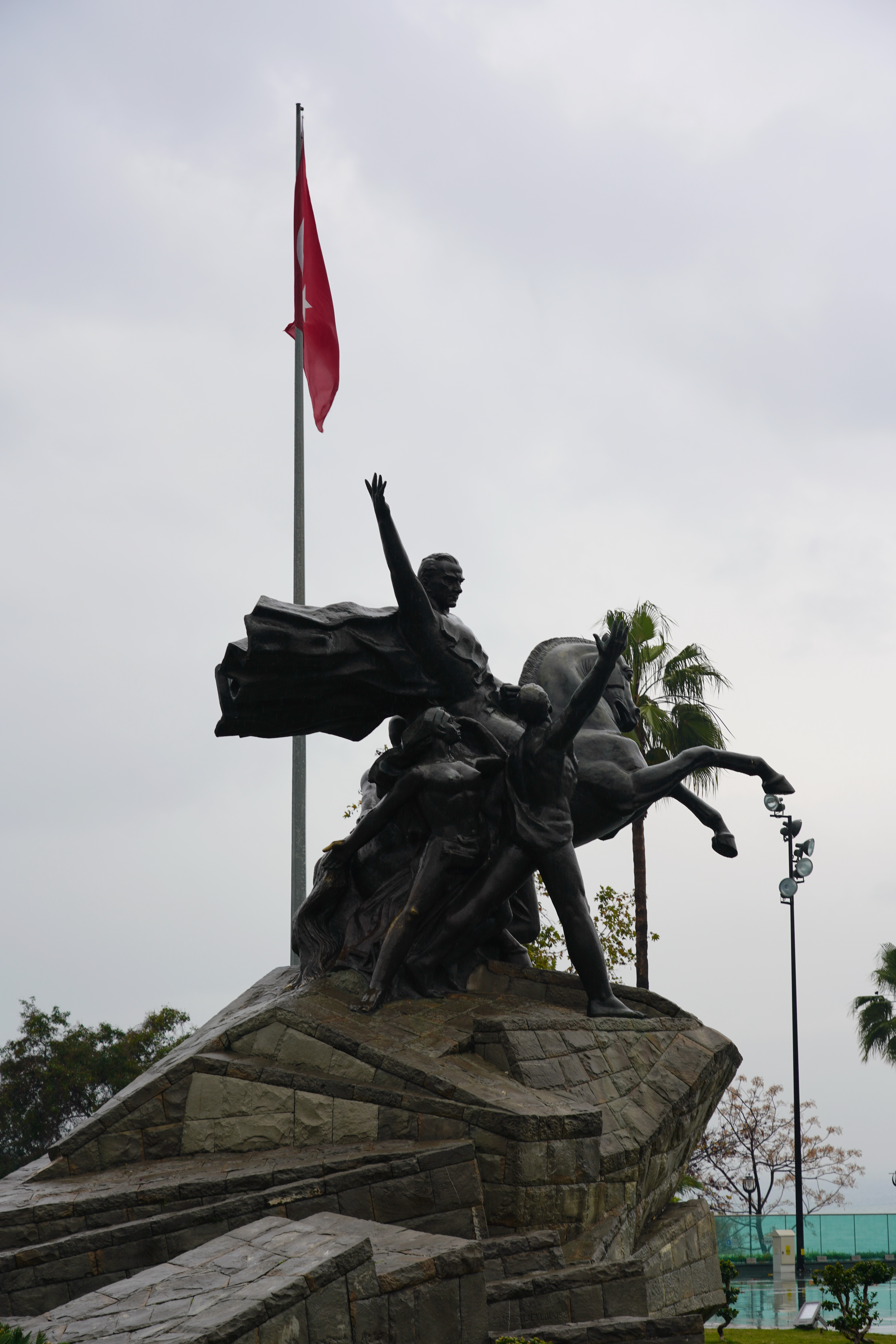 Monumento a Mustafa Kemal Atatürk